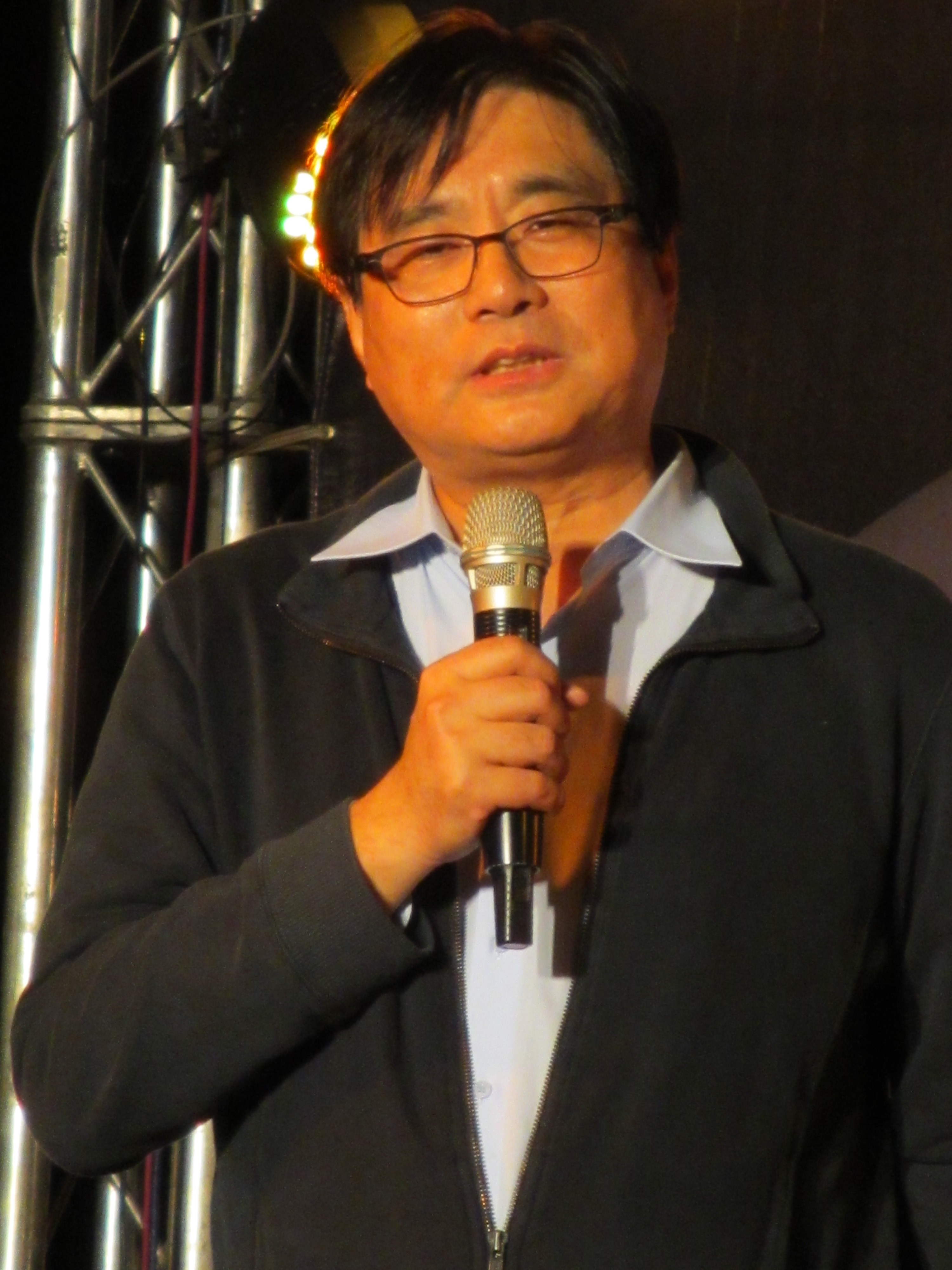 中文（台灣）: 台灣關懷中國人權聯盟理事長楊憲宏。